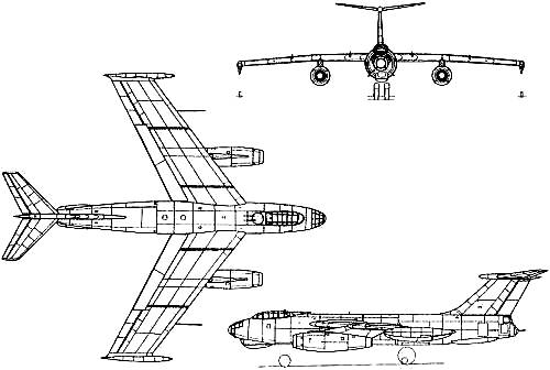 El Alekseev tipo 150 fue un tipo de bombardero de largo alcance producido en la Unión Soviética en los 1940s gracias a la ayuda de cientificos alemanes capturados de la Junkers. El Alekseev Tipo 150,uno de los últimos desarrollos del equipo ruso-alemán. Era un bombardero a medio camino entre el Il-28 y el Tu-16.